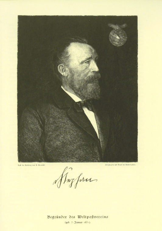 Porträt des Staatssekretärs Dr. von Stephan